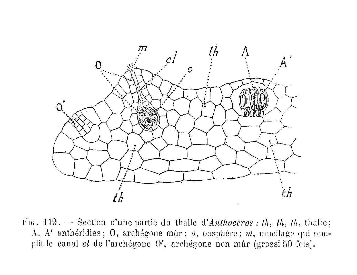 Anthoceros - thalle 1